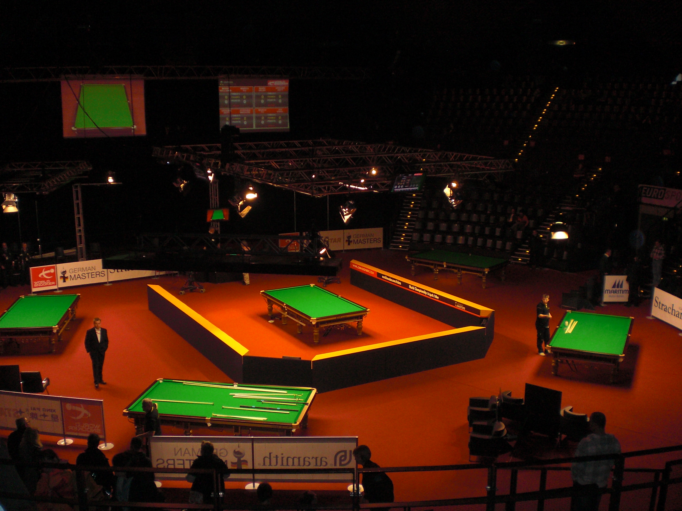 German Masters 2011 im Tempodrom in Berlin, Aufstellung der Snookertische